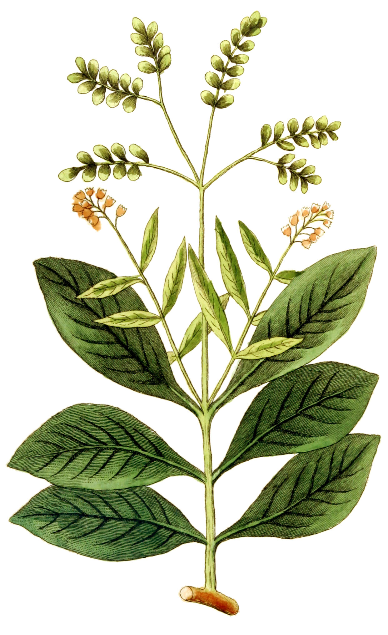 Tab. 77 from Vervolg ob de Avbeeldingen der artseny-gewassen met derzelver Nederduitsche en Latynsche beschryvingen, Eersde Deel